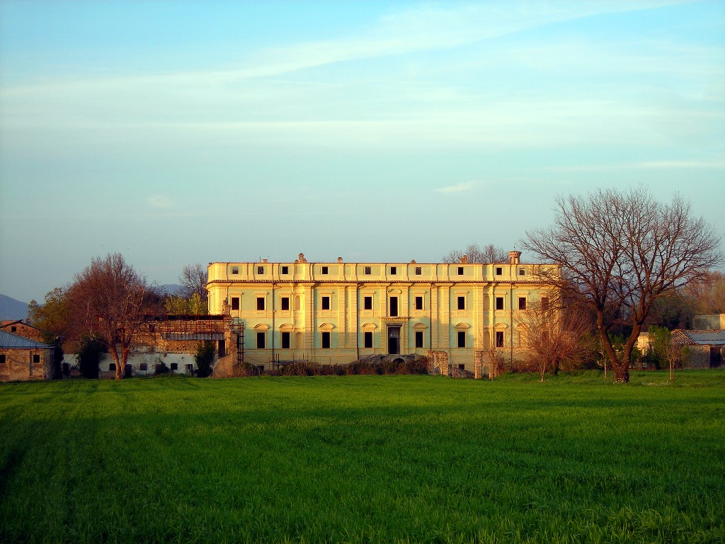 Villa Boccaglione, Passaggio, Bettona, Perugia, Umbria, Italy